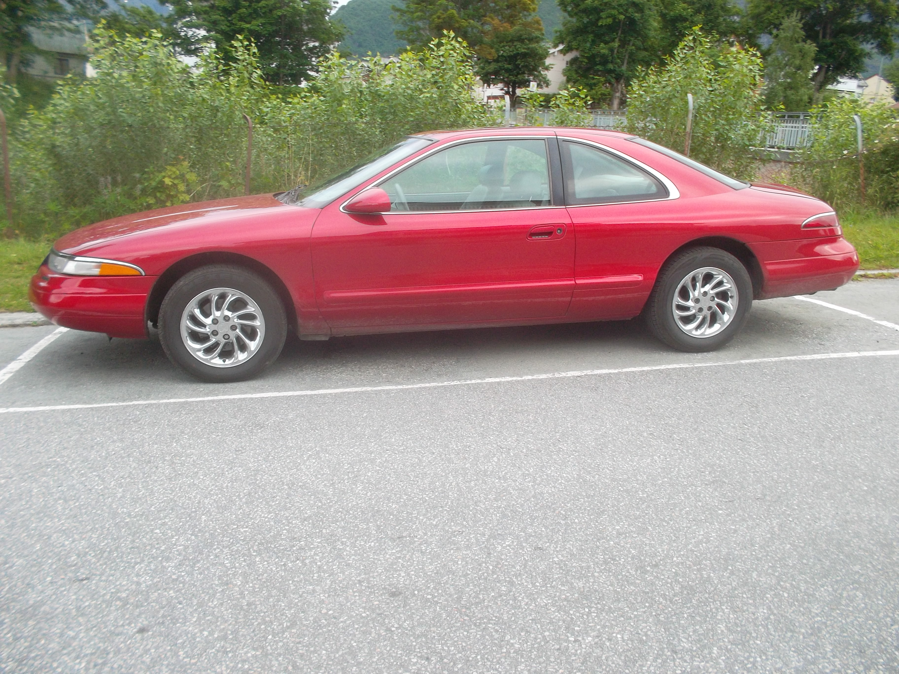 Seitenansicht eines roten Lincoln Mark VIII (Baujahr 1992-1998) in Norwegen